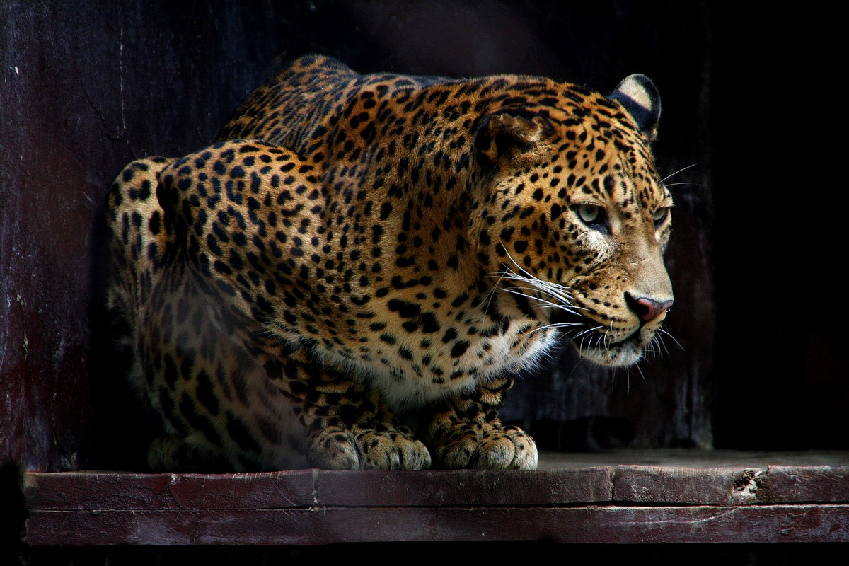 venkovní výběh